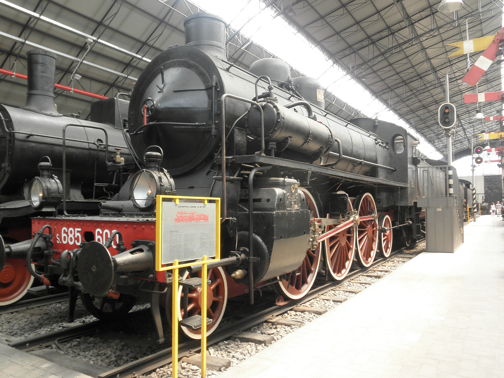 Locomotiva a vapore S.685.600 delle Ferrovie dello Stato conservata al Museo della Scienza e della Tecnologia di Milano.